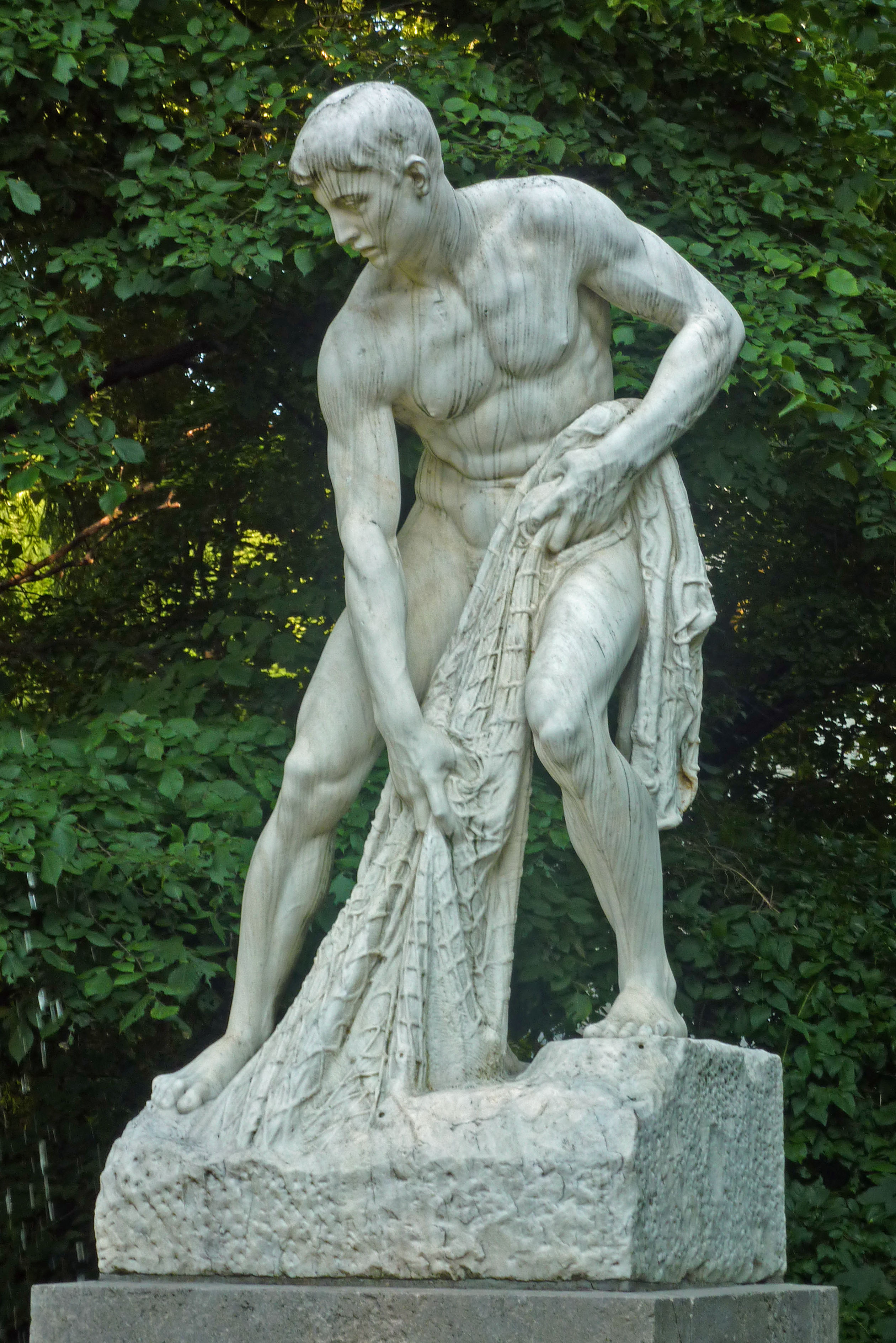 Skulptur 'Stralauer Fischer' im 'Fischerbrunnen' von Reinhold Felderhoff am Rathaus Treptow in Berlin-Plänterwald.